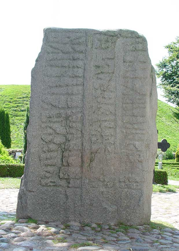 Runenstein Gorm für Thyre (Rückseite) an der Kirche in Jelling